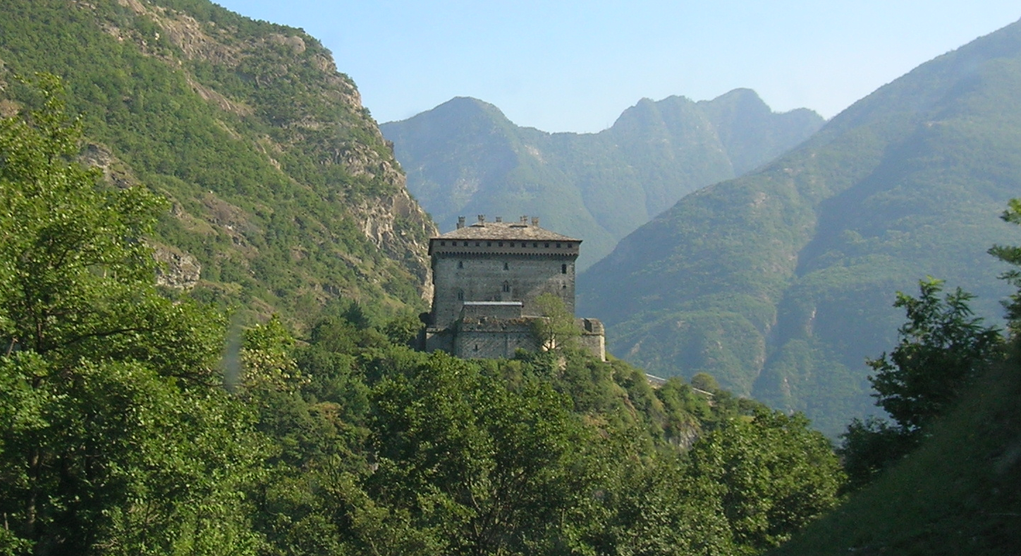 Castello Verrès fotografato dalla SR45